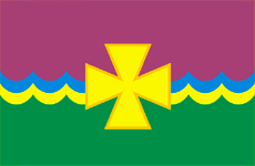 Флаг Ямпольского района Винницкой области